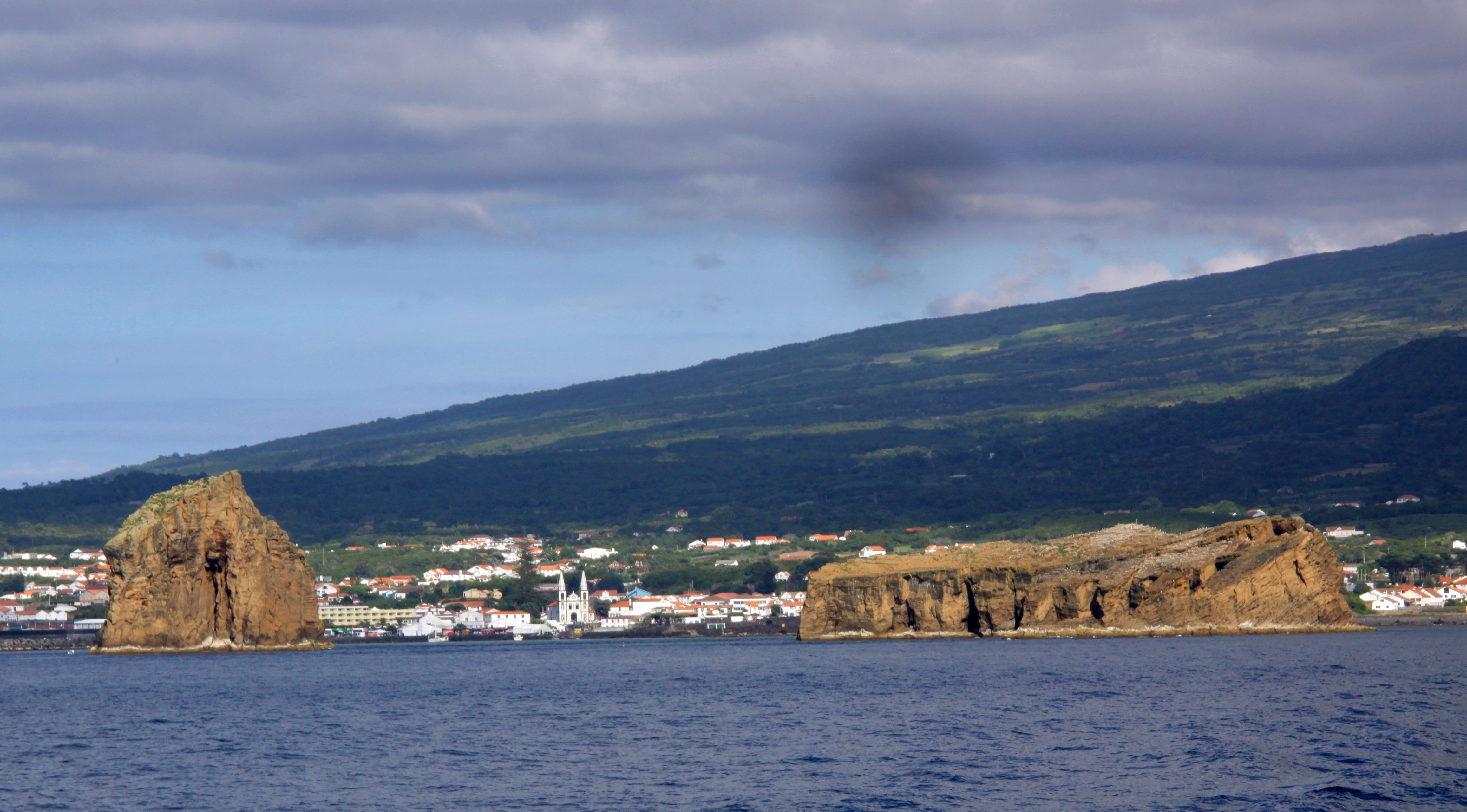 Açores, traversée en bateau entre Pico et Faial. Vue vers Madalena.